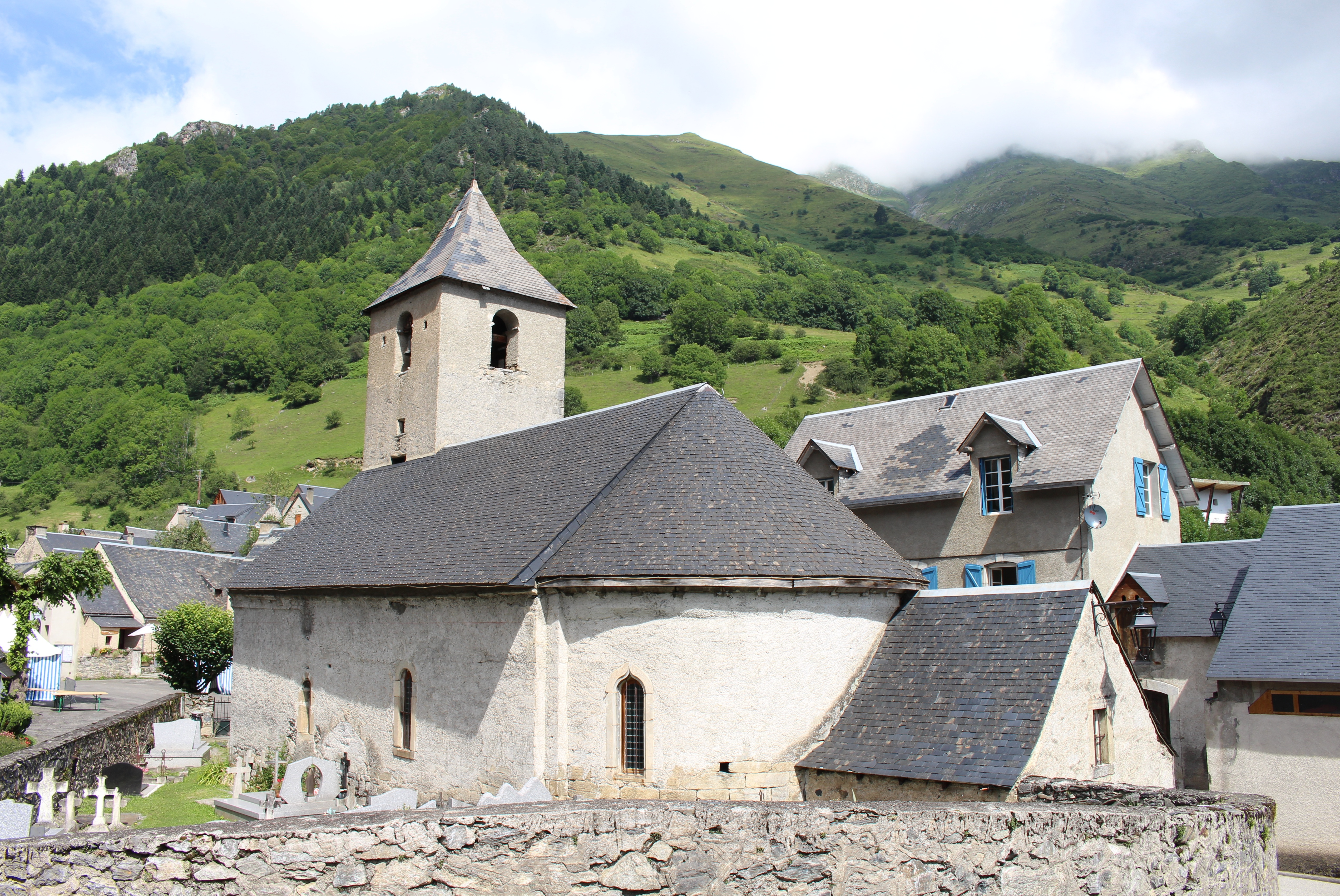 Église Saint-Félix-de-Valois d'Aulon (Hautes-Pyrénées)